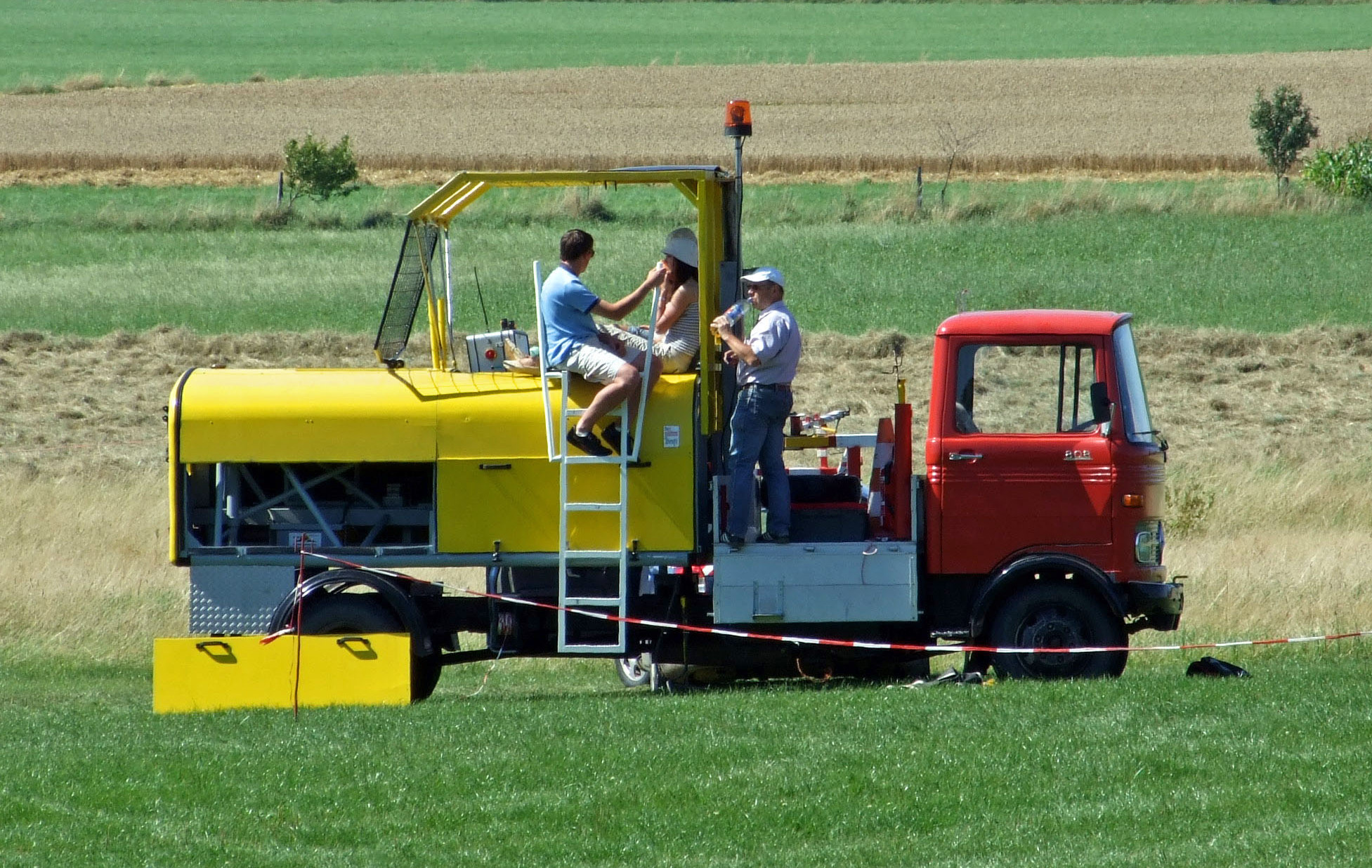 fahrbare Schleppwinde, Flugplatz Anspach Taunus